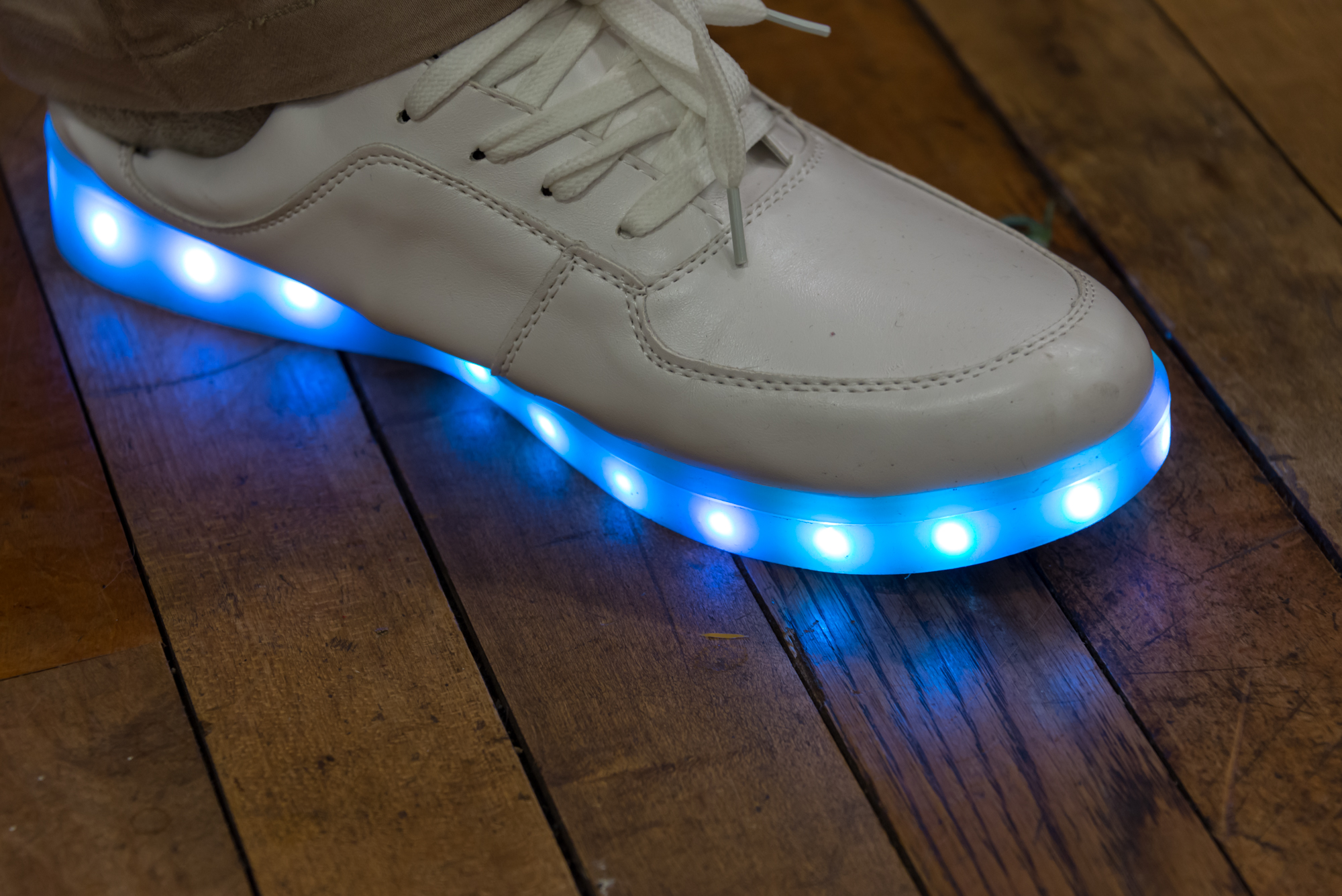 photo by Takumi Sano, ISAC Tokyo Bureau, CC BY. [1] 2014.09.29